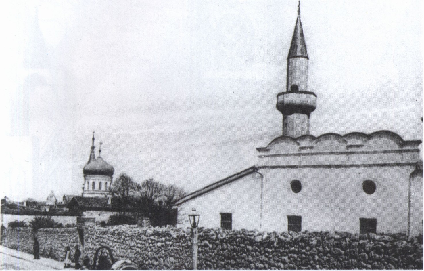 Мечеть Кебир-Джами. Симферополь. С почтовой карточки, не позднее 1916 года.